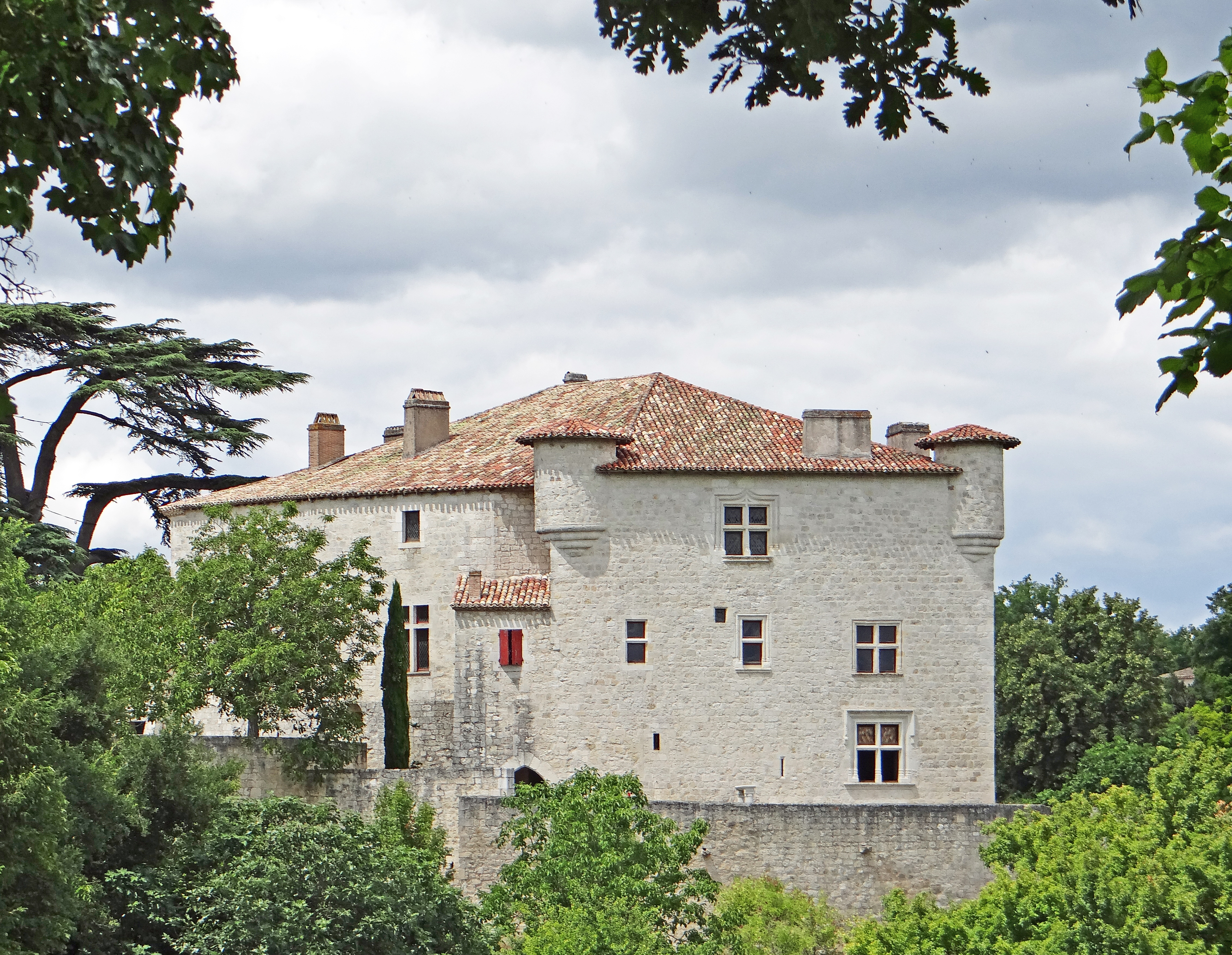 Engayrac - Château de la Combebonnet - Façade sud